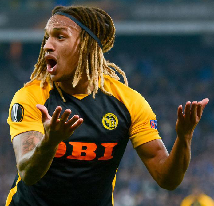 Динамо - Янг Бойз (2:2) фото с матча